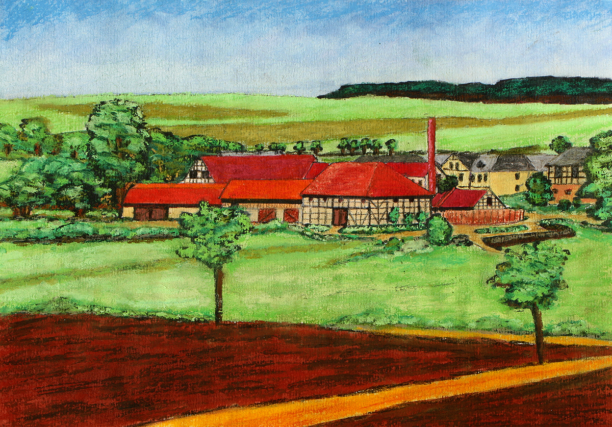 Rittergut Külmla, abgemalt von einem Schwarz-Weiß-Foto des Dorfes und des Gutes aus den frühen 1920er Jahren, von Sven Samesch